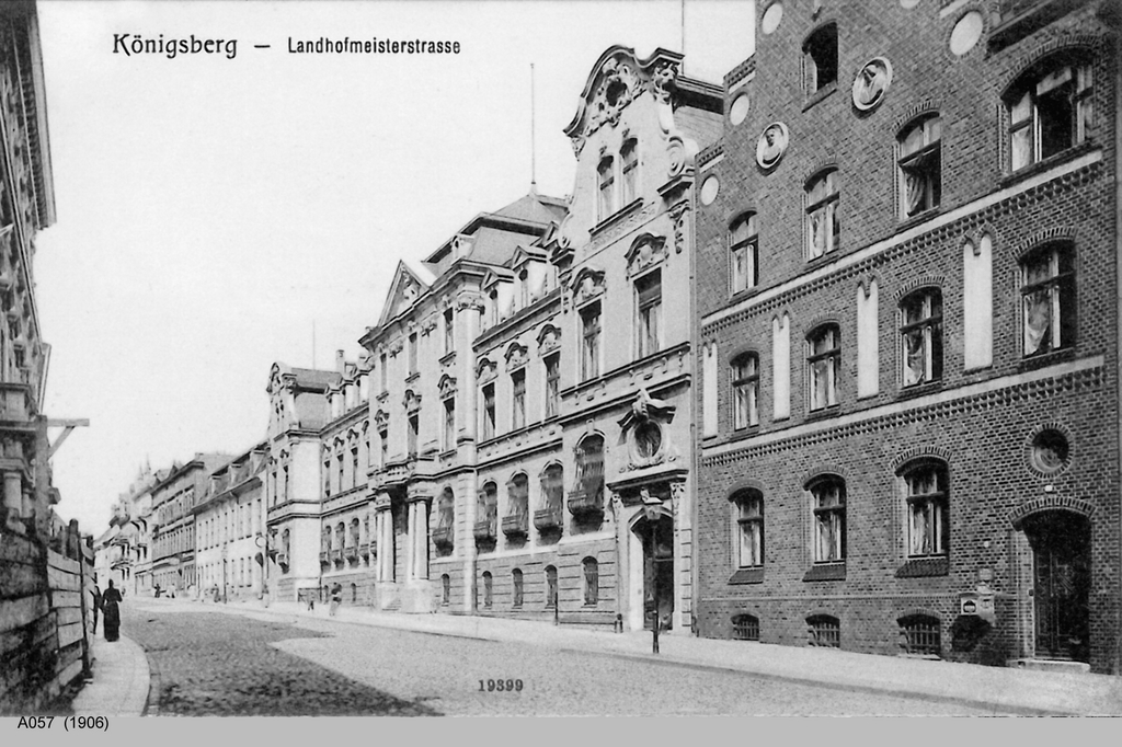 Königsberg